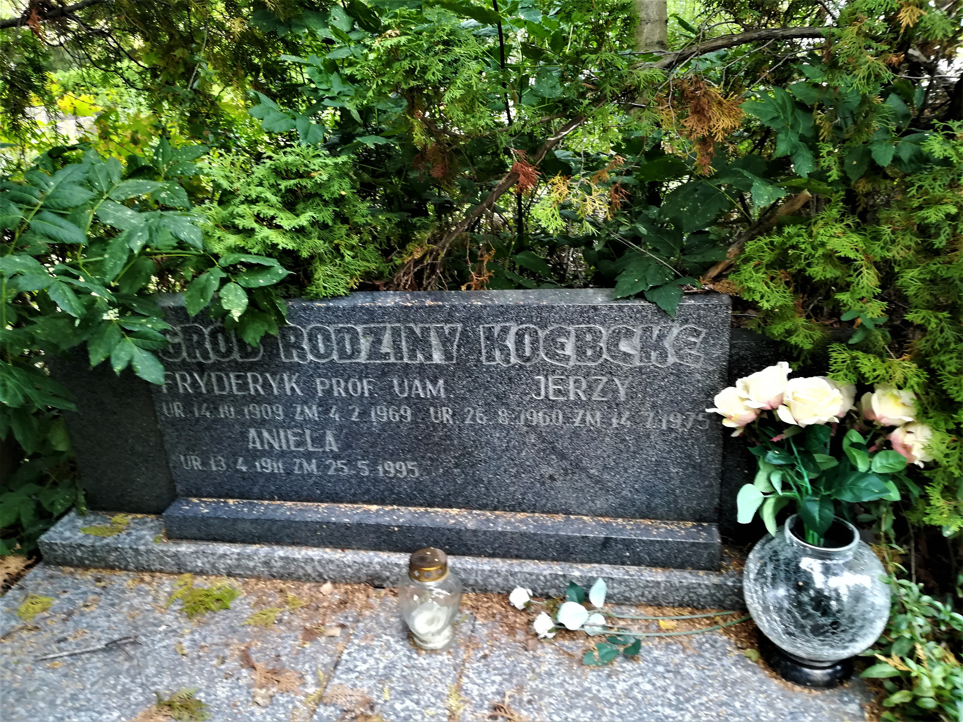 Prof. Fryderyk Koebcke - grób na cm. junikowskim w Poznaniu.